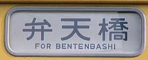 方向幕;弁天橋